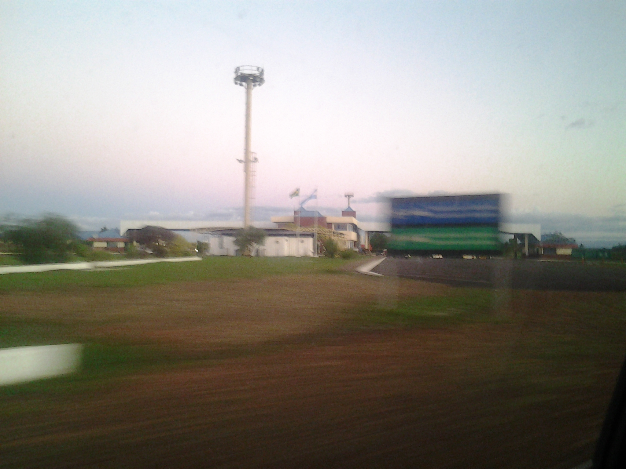 Zona de frontera integrada en el Puente de la Integración, que une Santo Tomé y São Borja. Tomada desde el lado argentino.